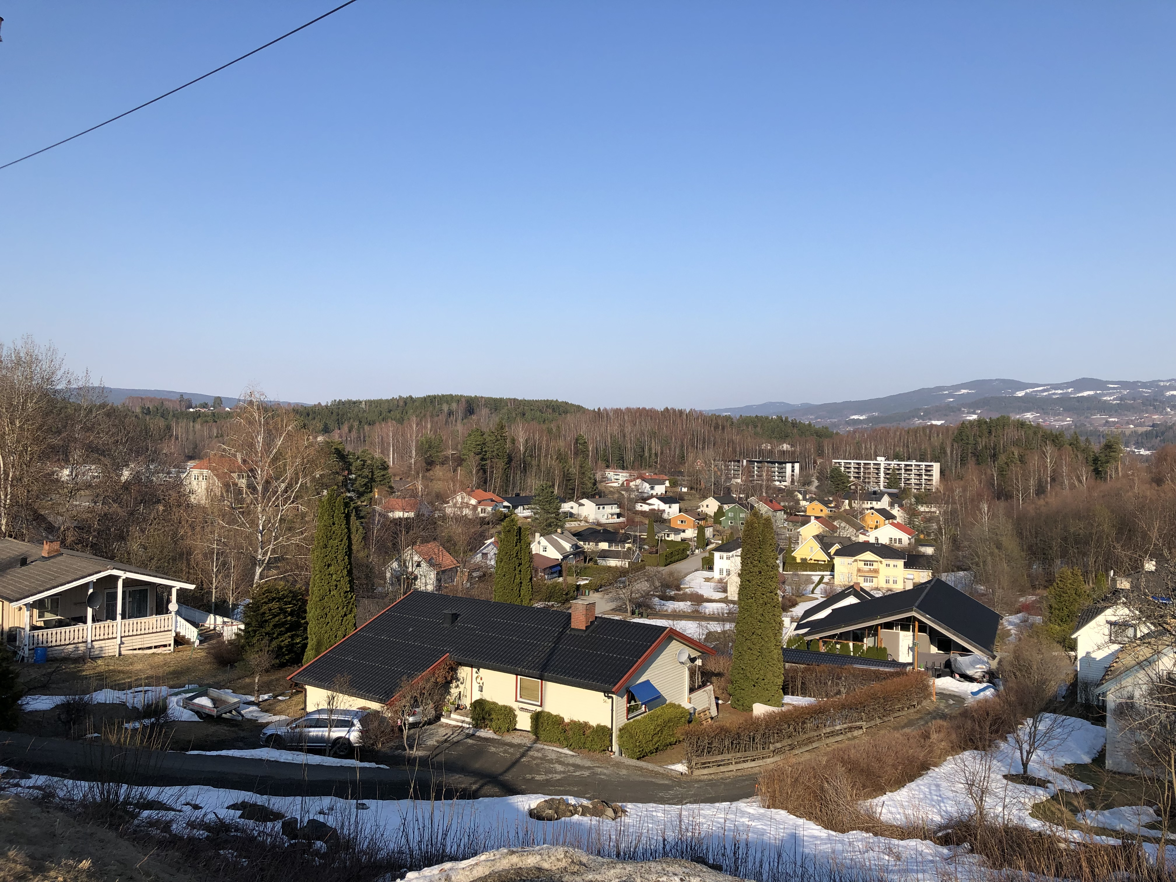 Lageshallen i Hønefoss, bilde fra Rabbaveien.